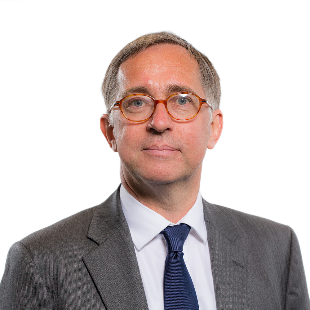 David Melding